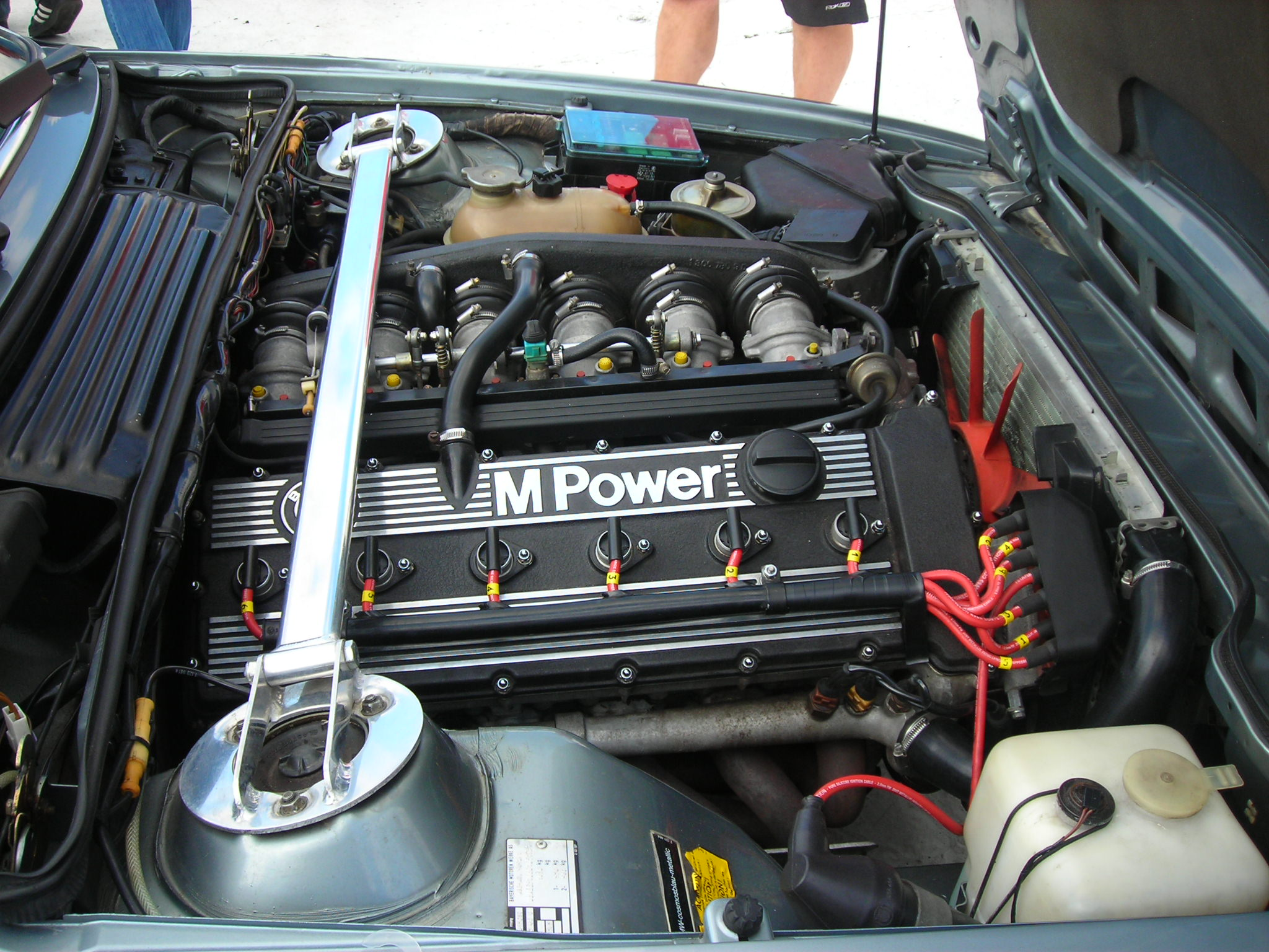 BMW M635CSi,///M6, S38,1985rok; 286KM, 340NM.